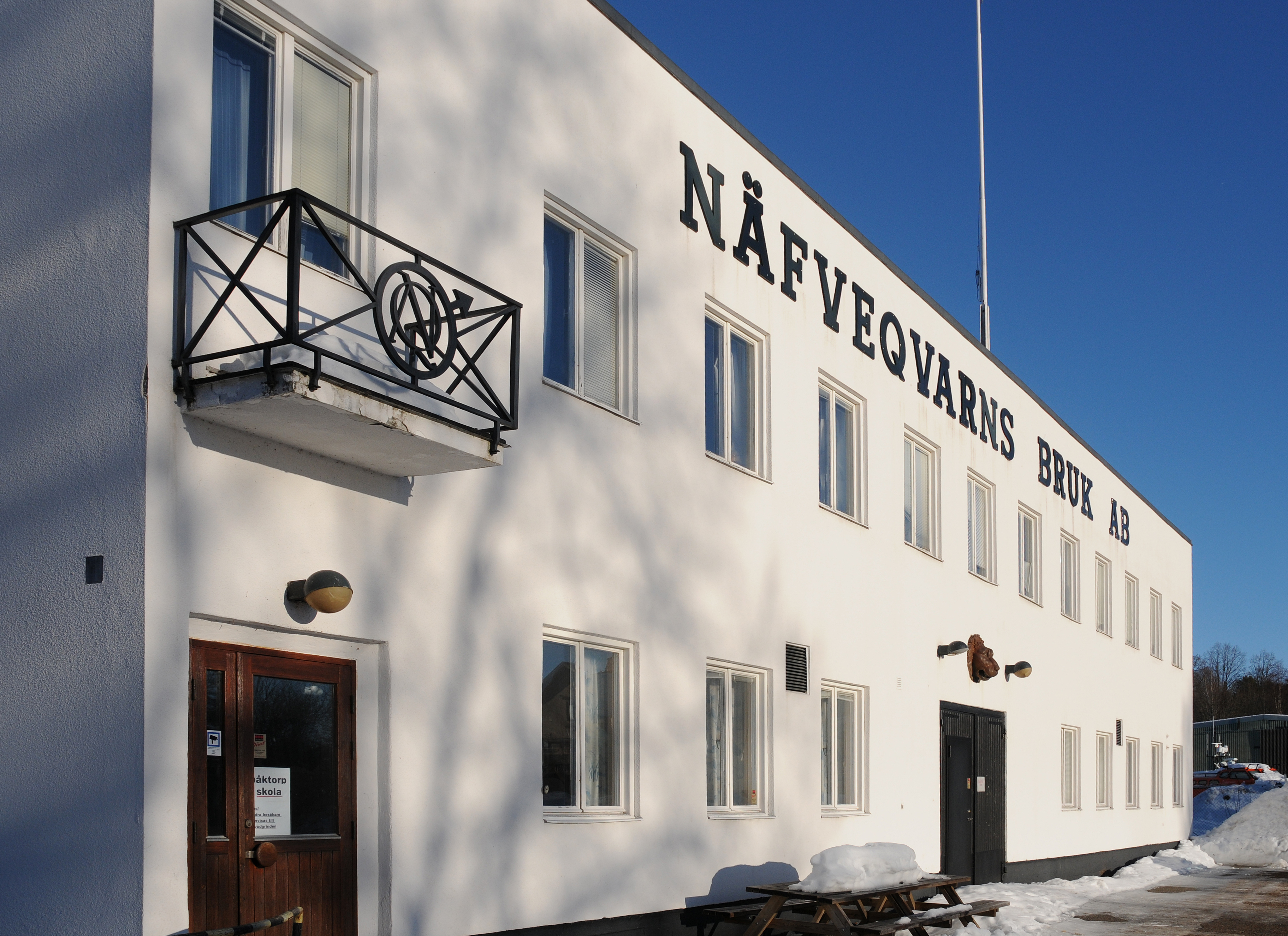 Nävekvarns bruk i januari 2011